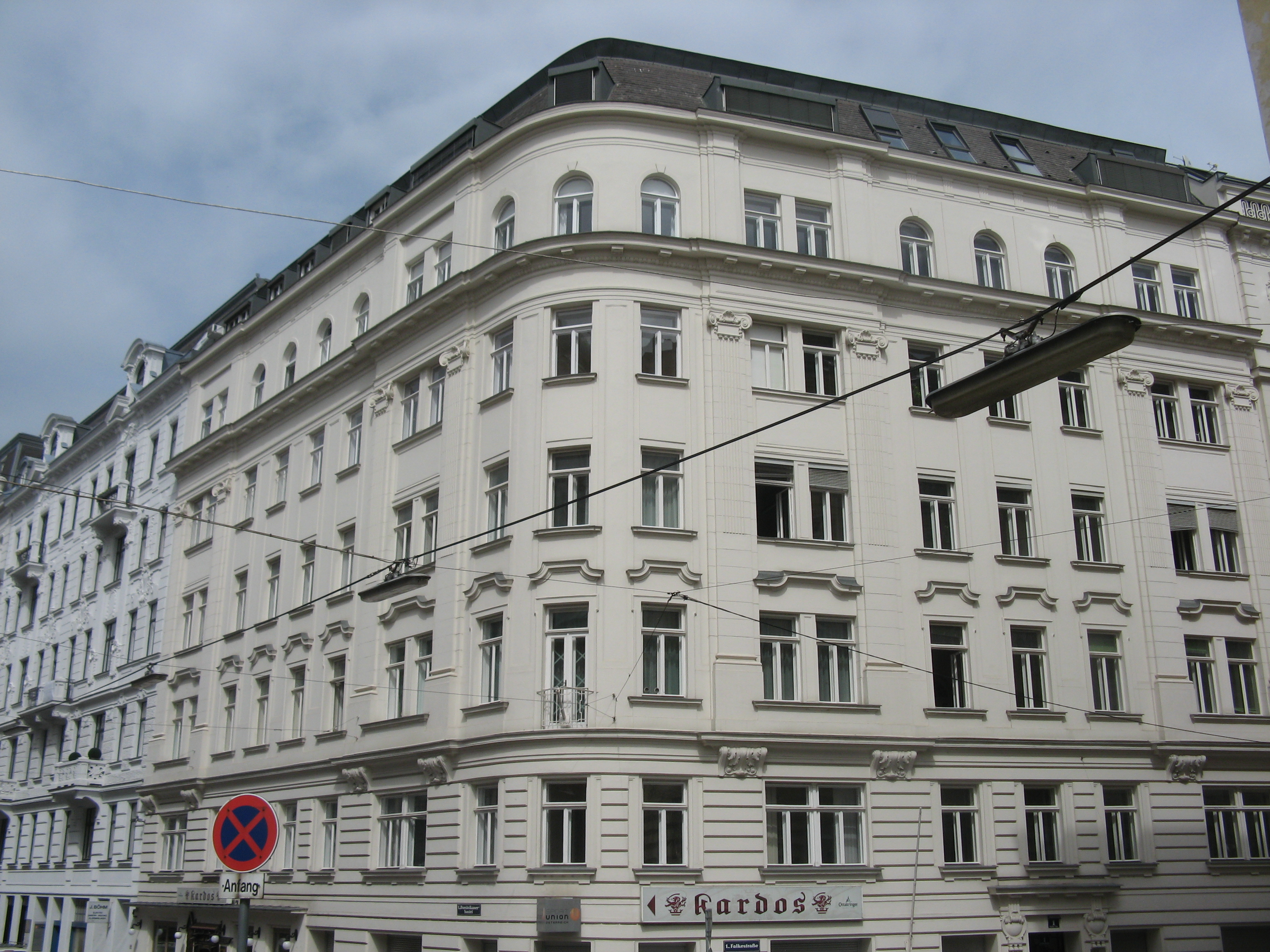 Haus (1907) von Felix Sauer, Falkestraße 1, Wien-Innere Stadt